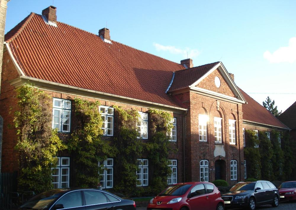 St. Georg Hospitel in Eutin